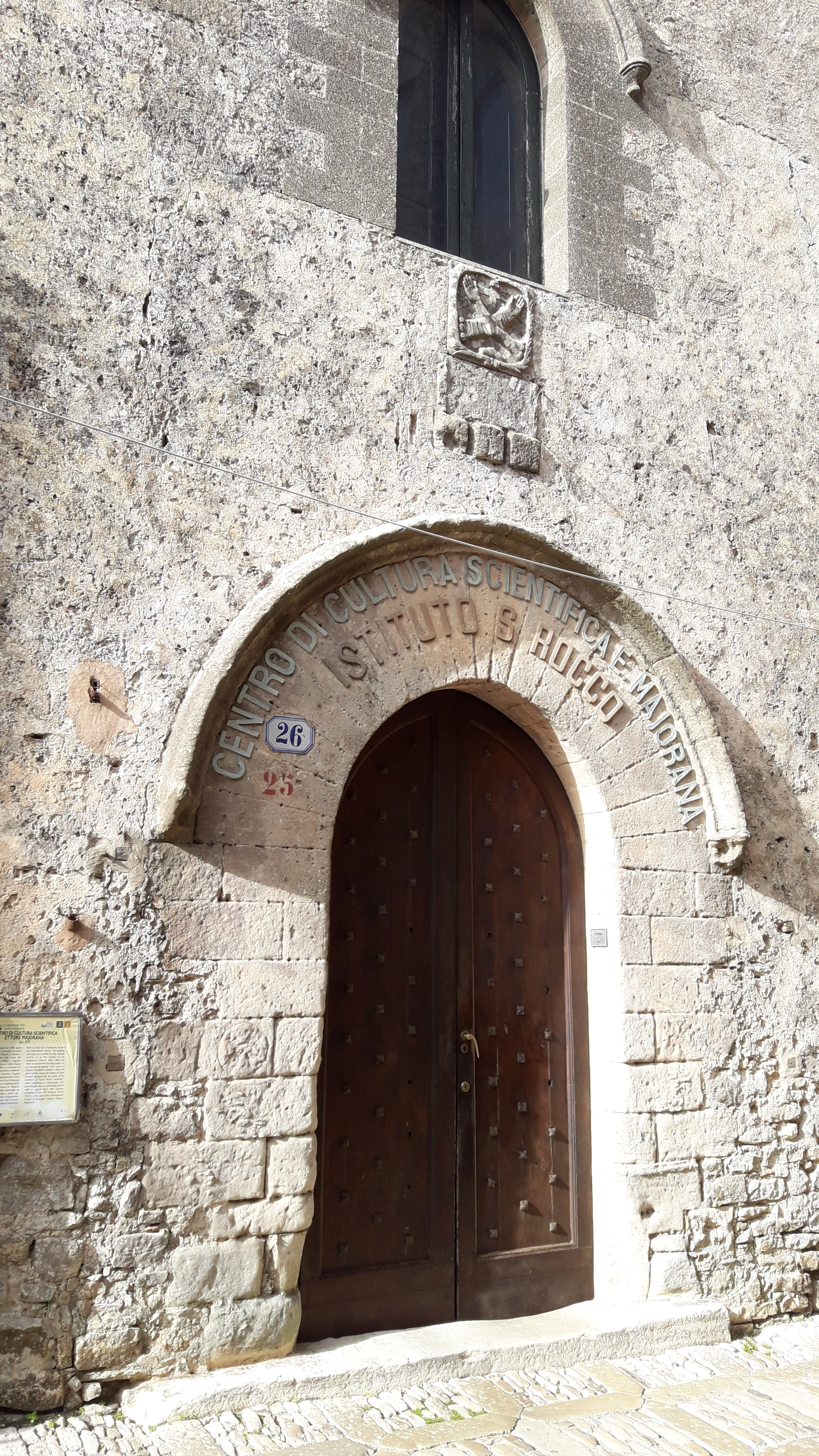 L'ex monastero di San Rocco, sede del "Ettore Majorana Foundation and Centre", ad Erice. Sicily